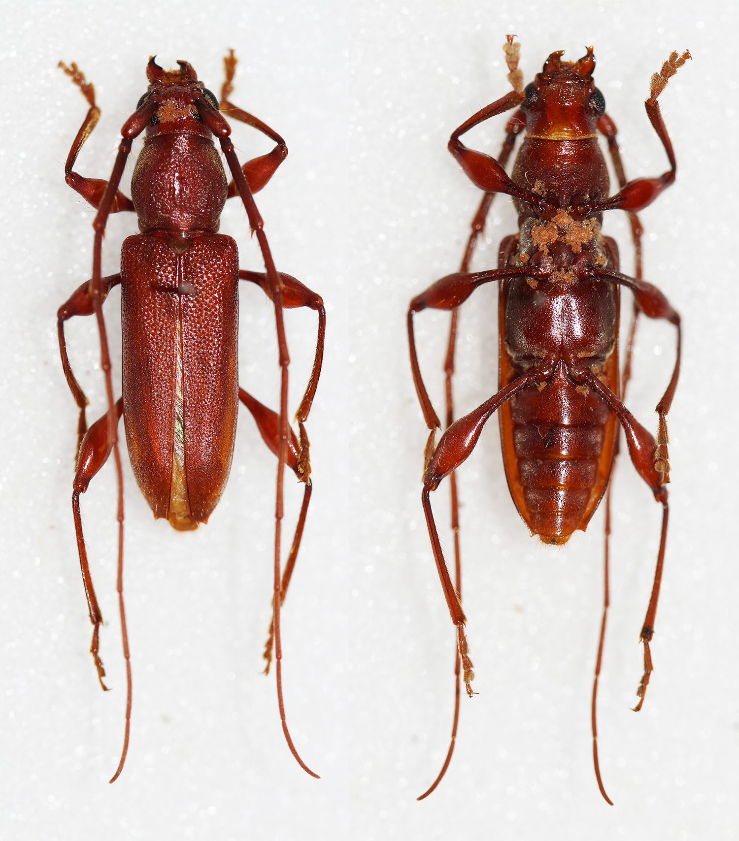 Pic,1923 Sex: Male Data: 08-06-14 - Highashihagio - Omuta City - Fukuoka - Japan Size: 14mm